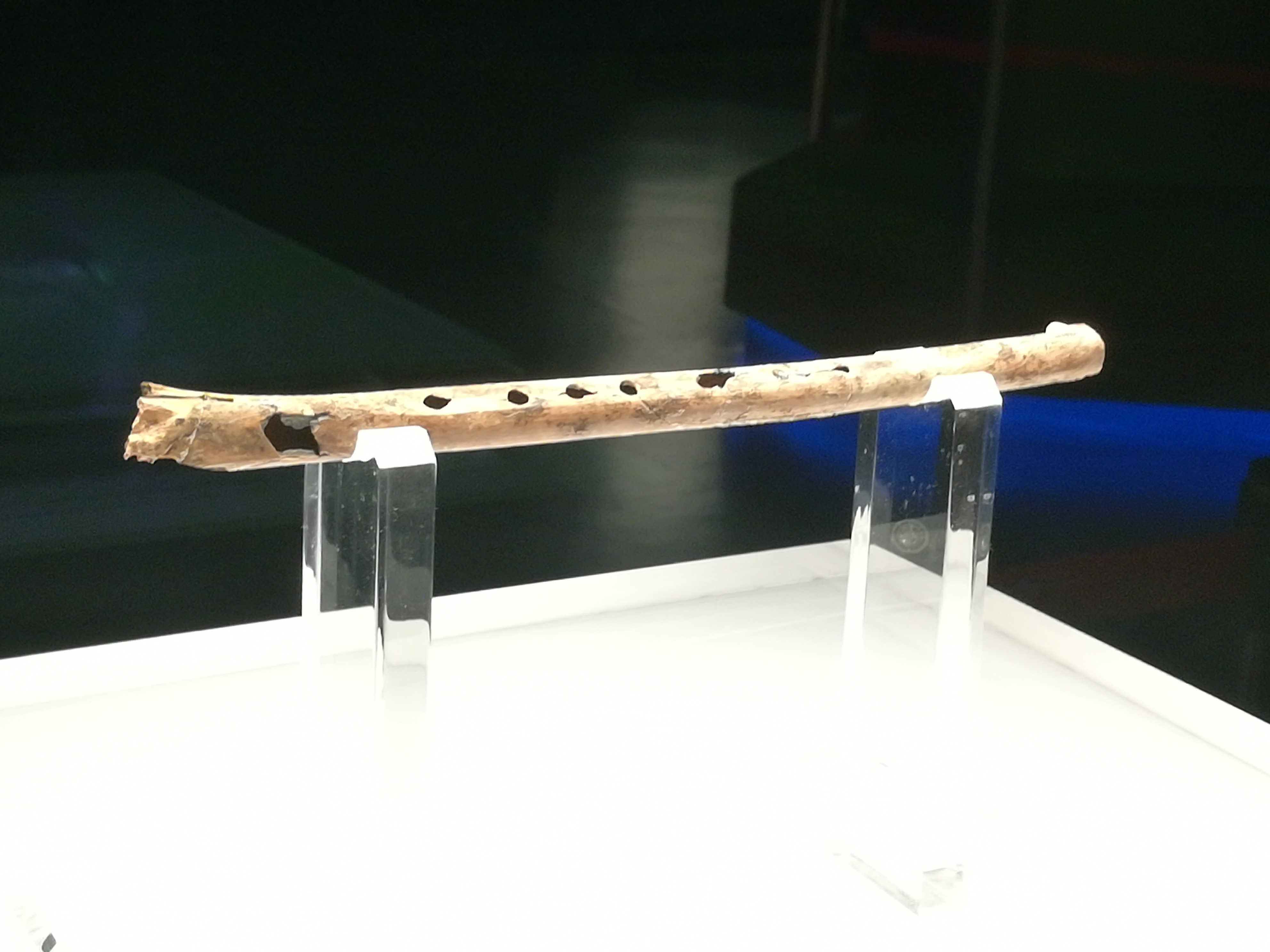 中文（中国大陆）: 从贾湖遗址出土的骨笛，藏于漯河市博物馆